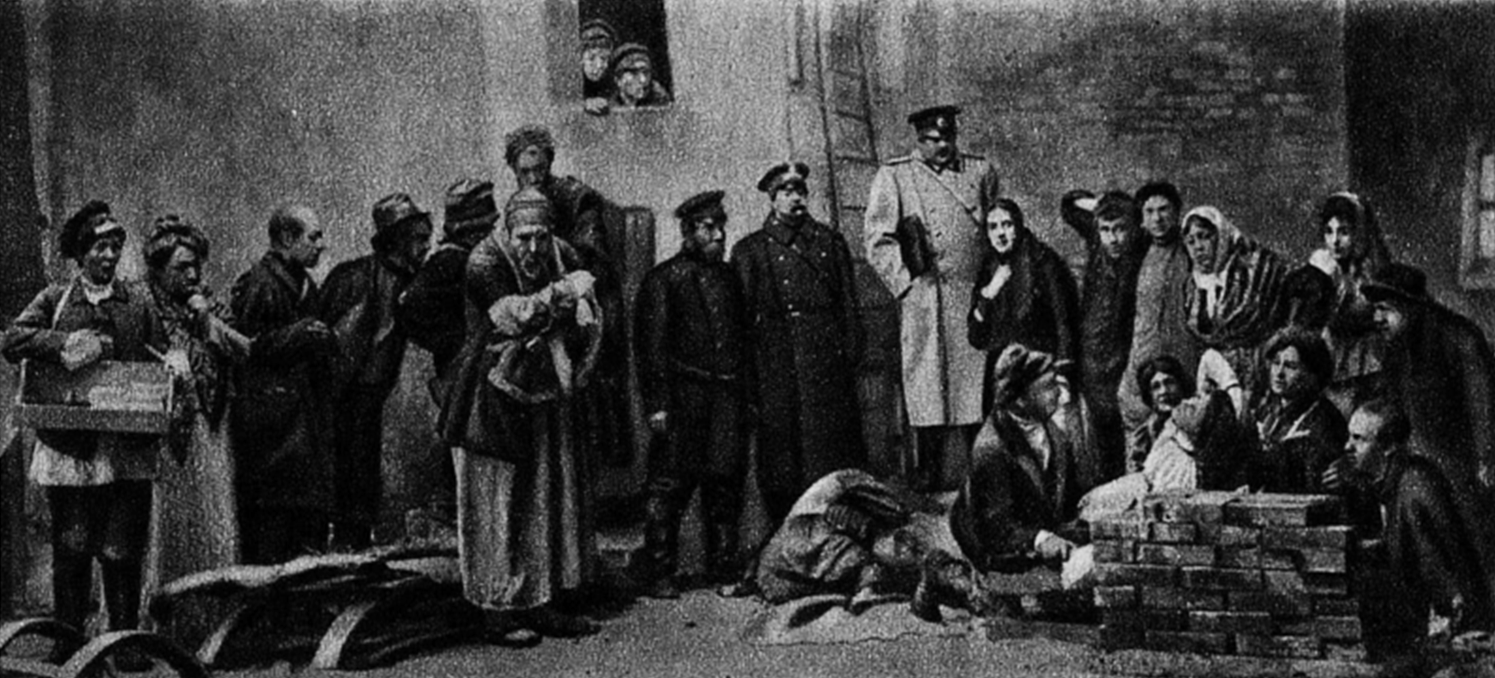 Uraufführung von Maxim Gorkis „Nachtasyl" 1902 in Moskau. Schlussszene aus den 3. Akt.